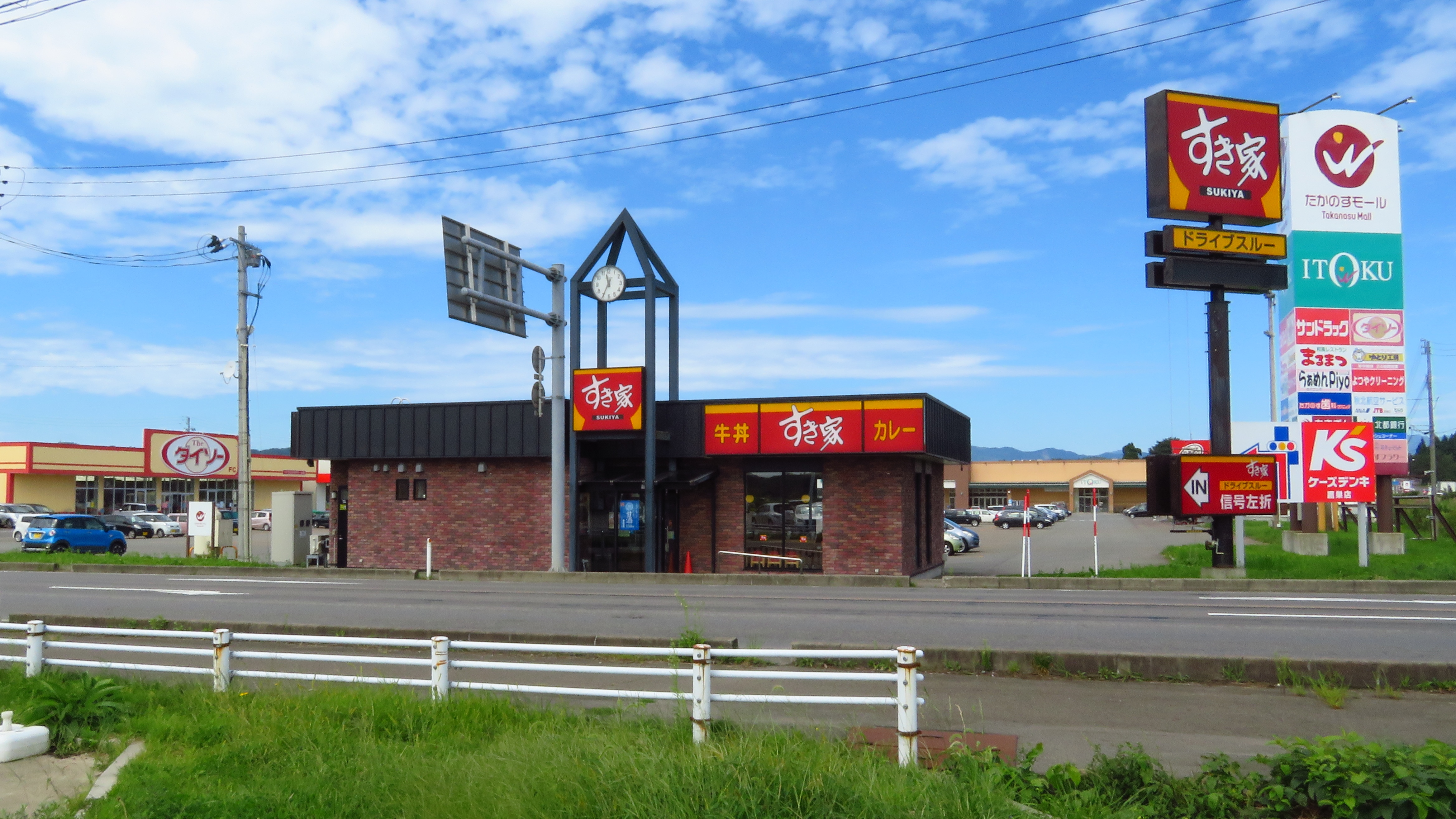 たかのすモール（秋田県北秋田市）